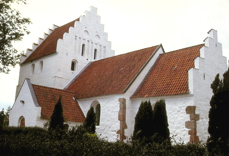 Brudager Kirke i Danmark. Brudager kirke